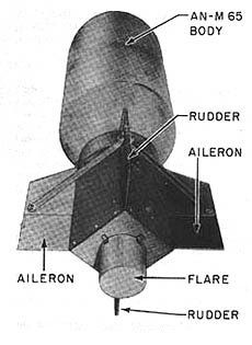 Amerykańska bomba VB-1 Azon